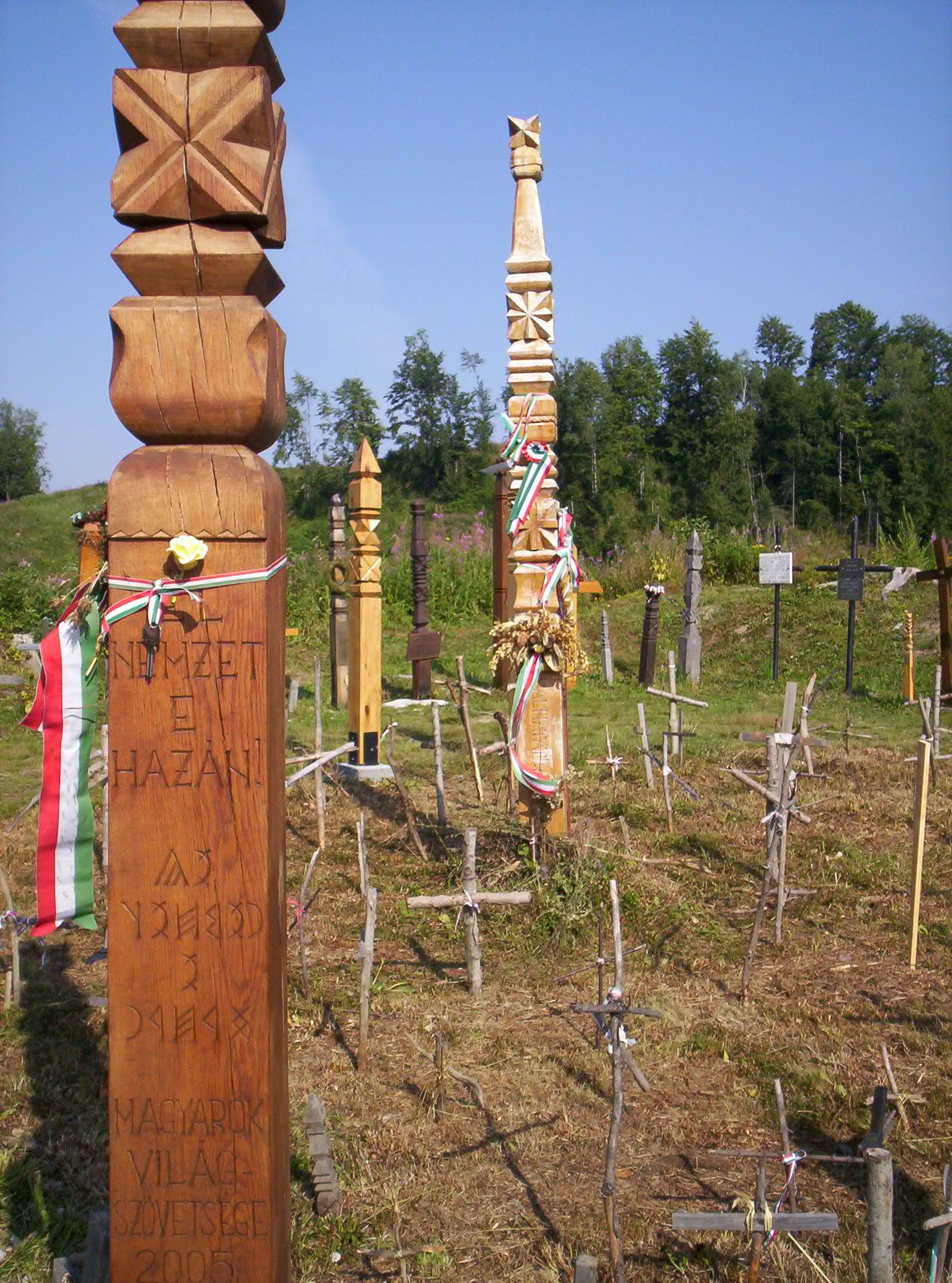 Székely hősök emlékhelye a Nyergestetőn – photo taken by uploader User:Csanády in 2006.